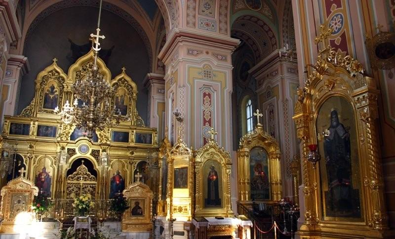 Warszawa (Polska)